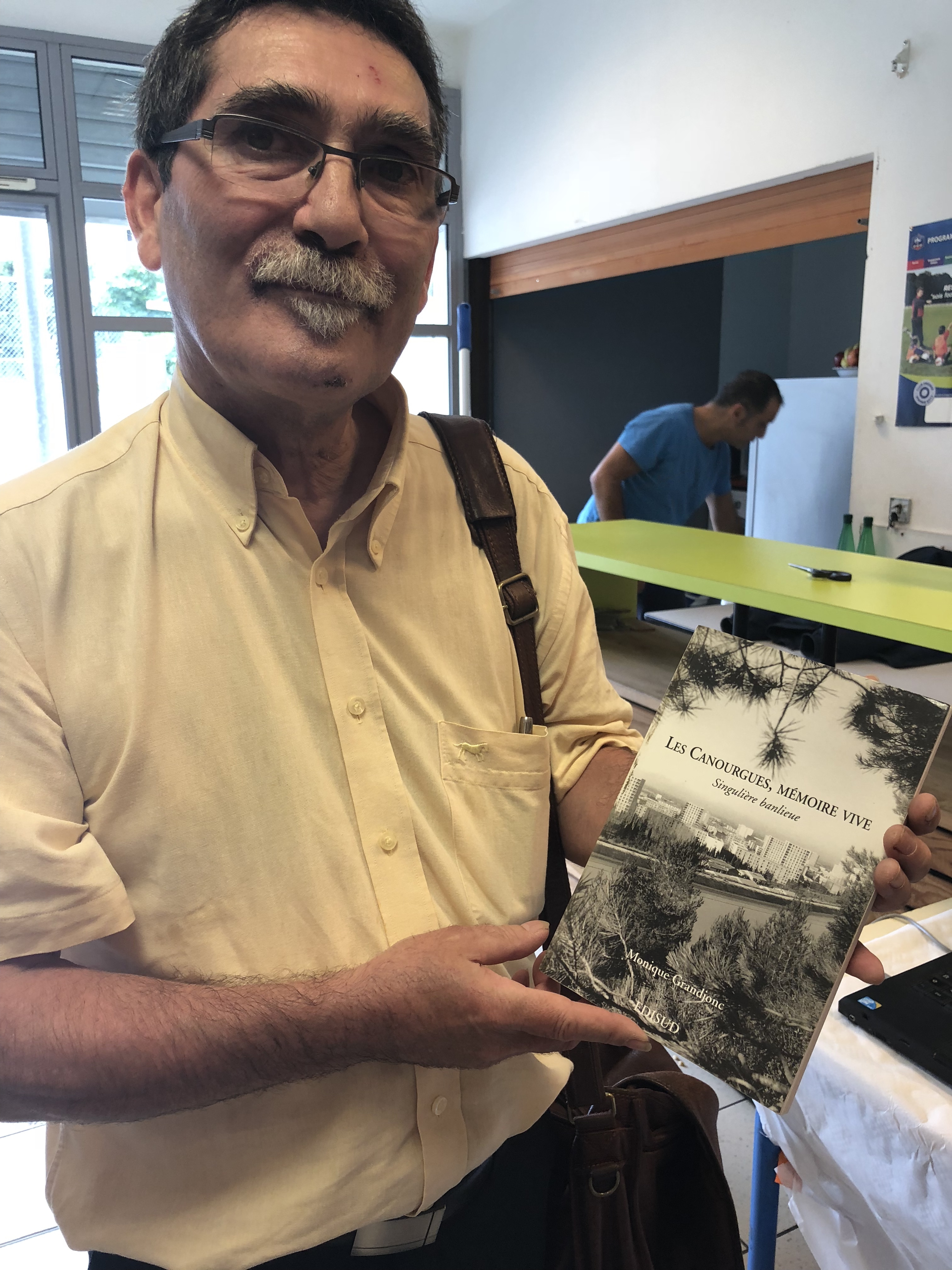 OPL de Canourgues à Salon de Provence, livre de Monique Grandjonc, Mémoires vives